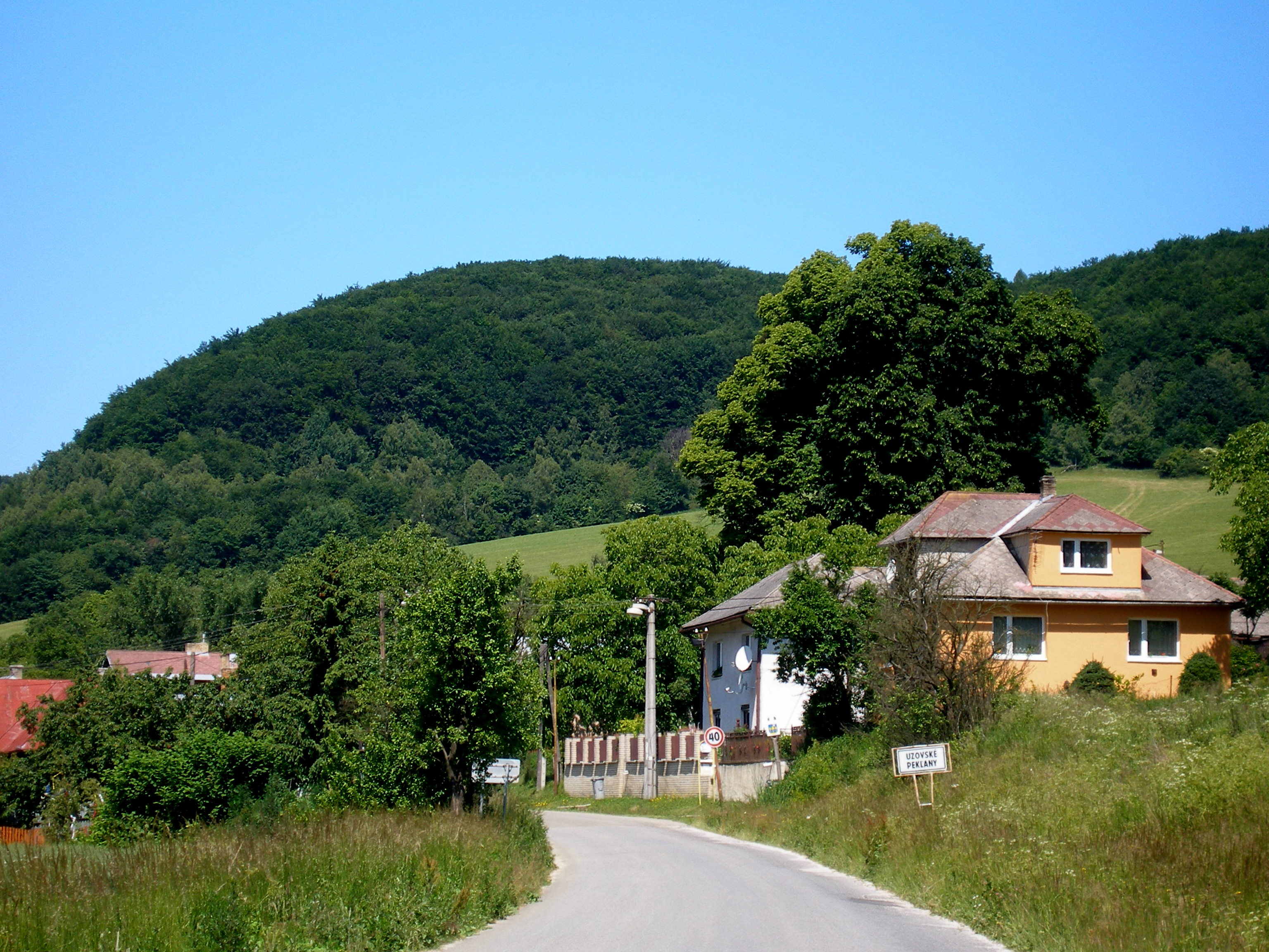 Obec Uzovské Pekľany okres Sabinov